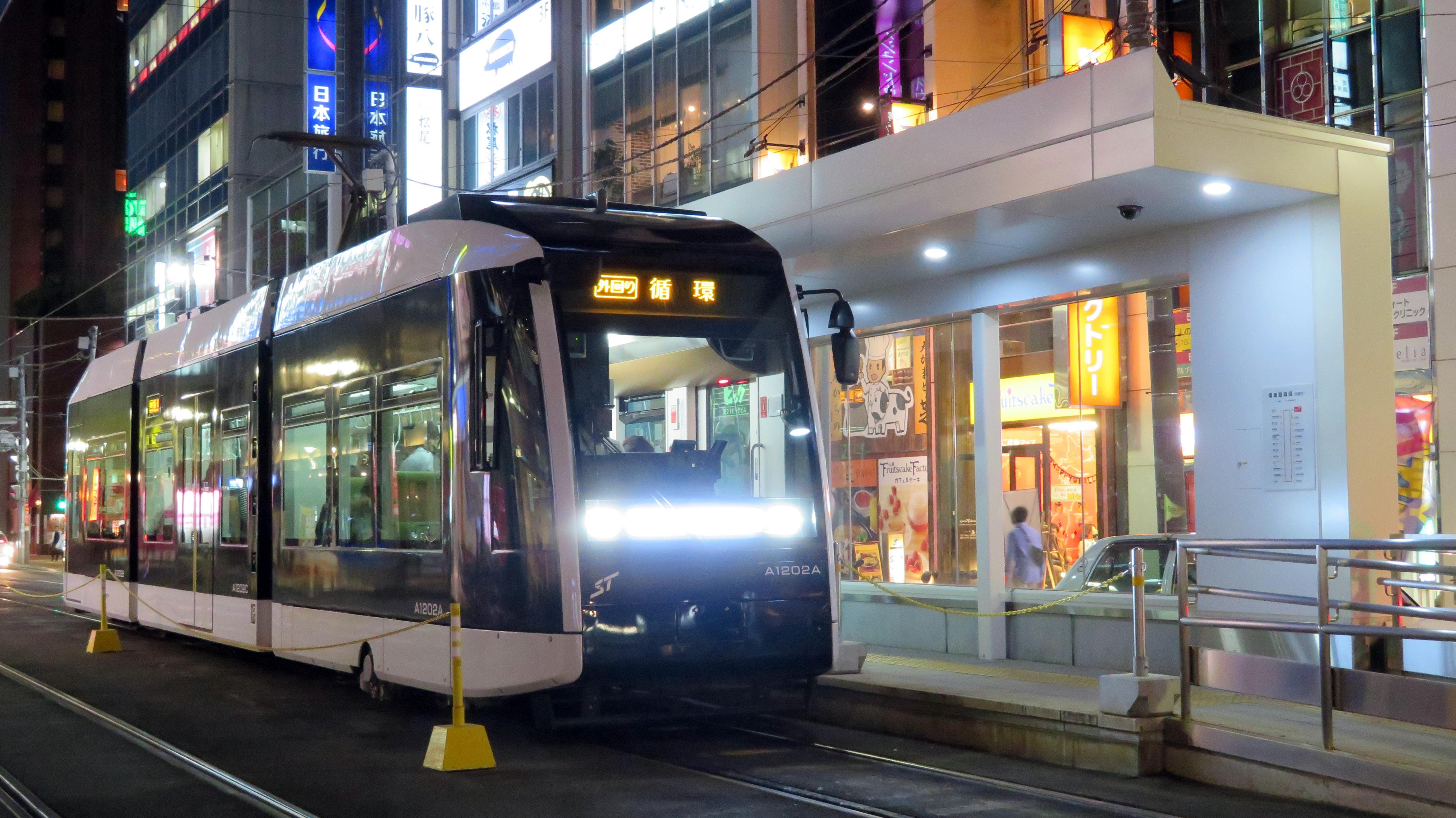 西4丁目停留所